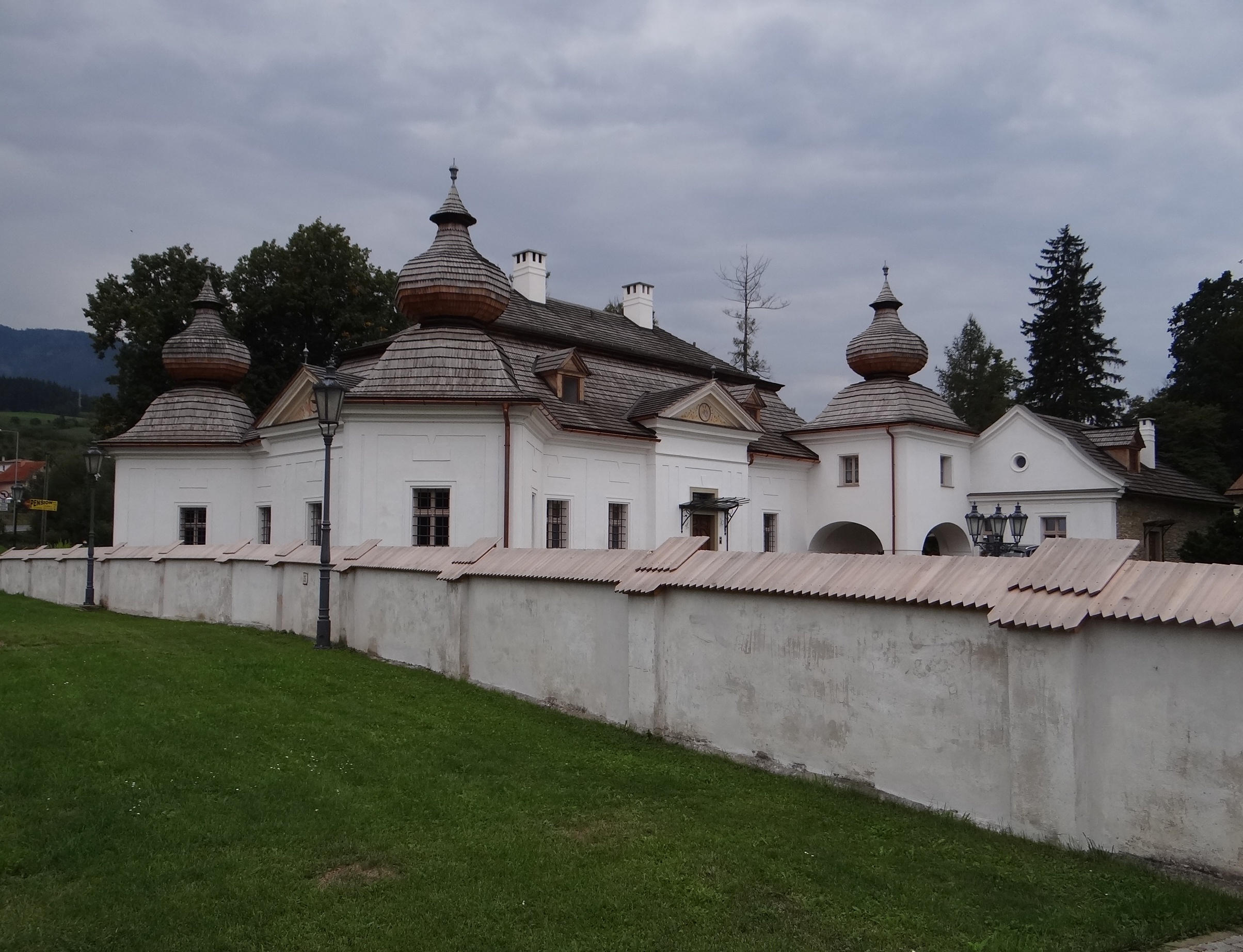 Manor in Vyšný Kubín